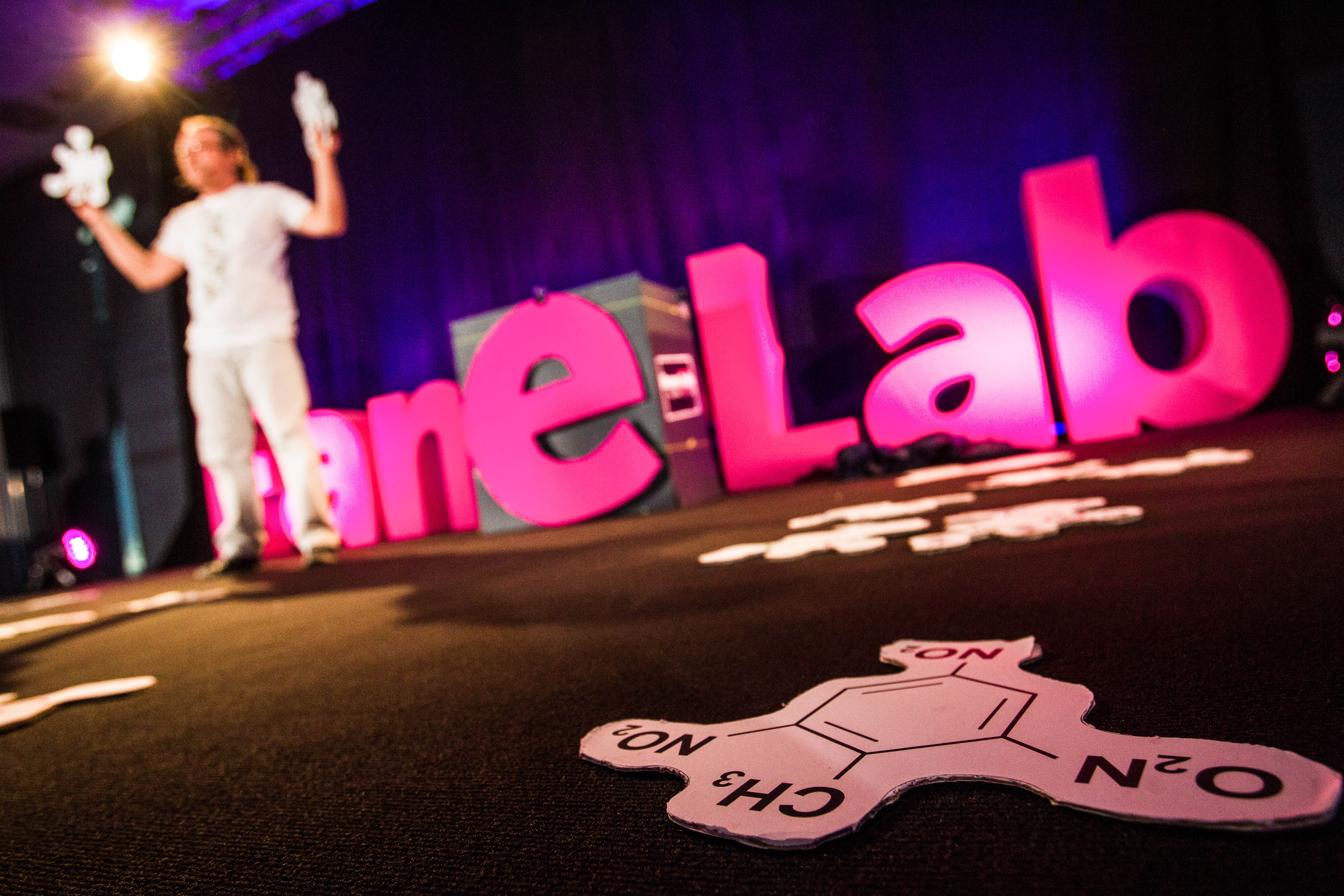 FameLab Poland - półfinały, 2019 r. w Centrum Nauki Kopernik w Warszawie